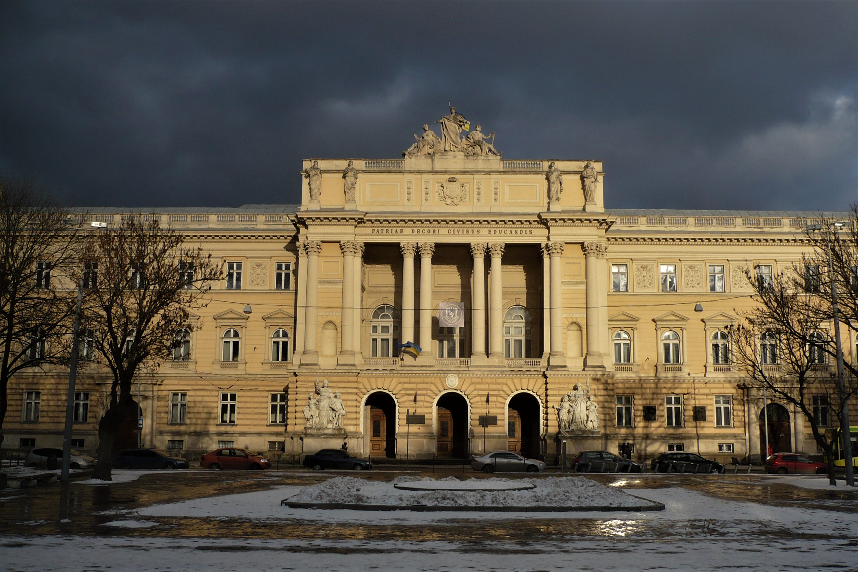 Uniwersytet lwowski